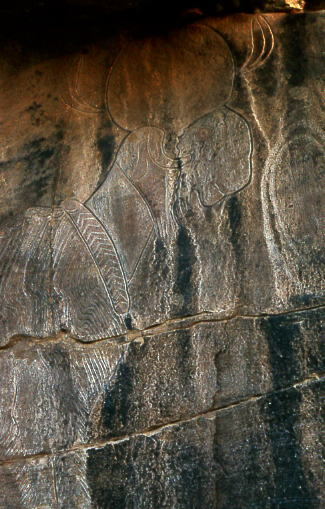 Gravure préhistorique du sud oranais (Algérie)